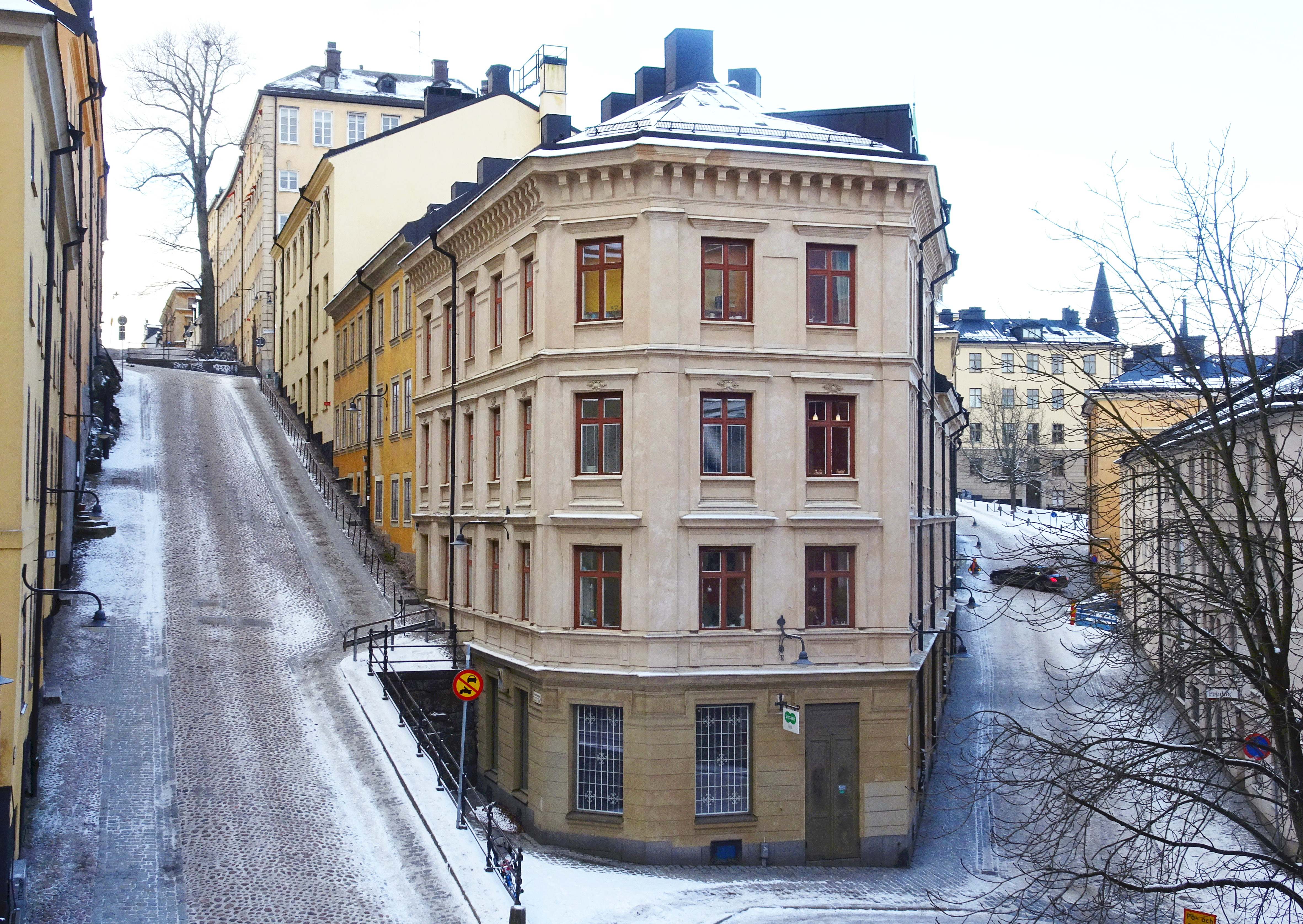 Kvarteret Fotangeln från öster, Brännkyrkagatan t.v. och Bastugatan t.h.